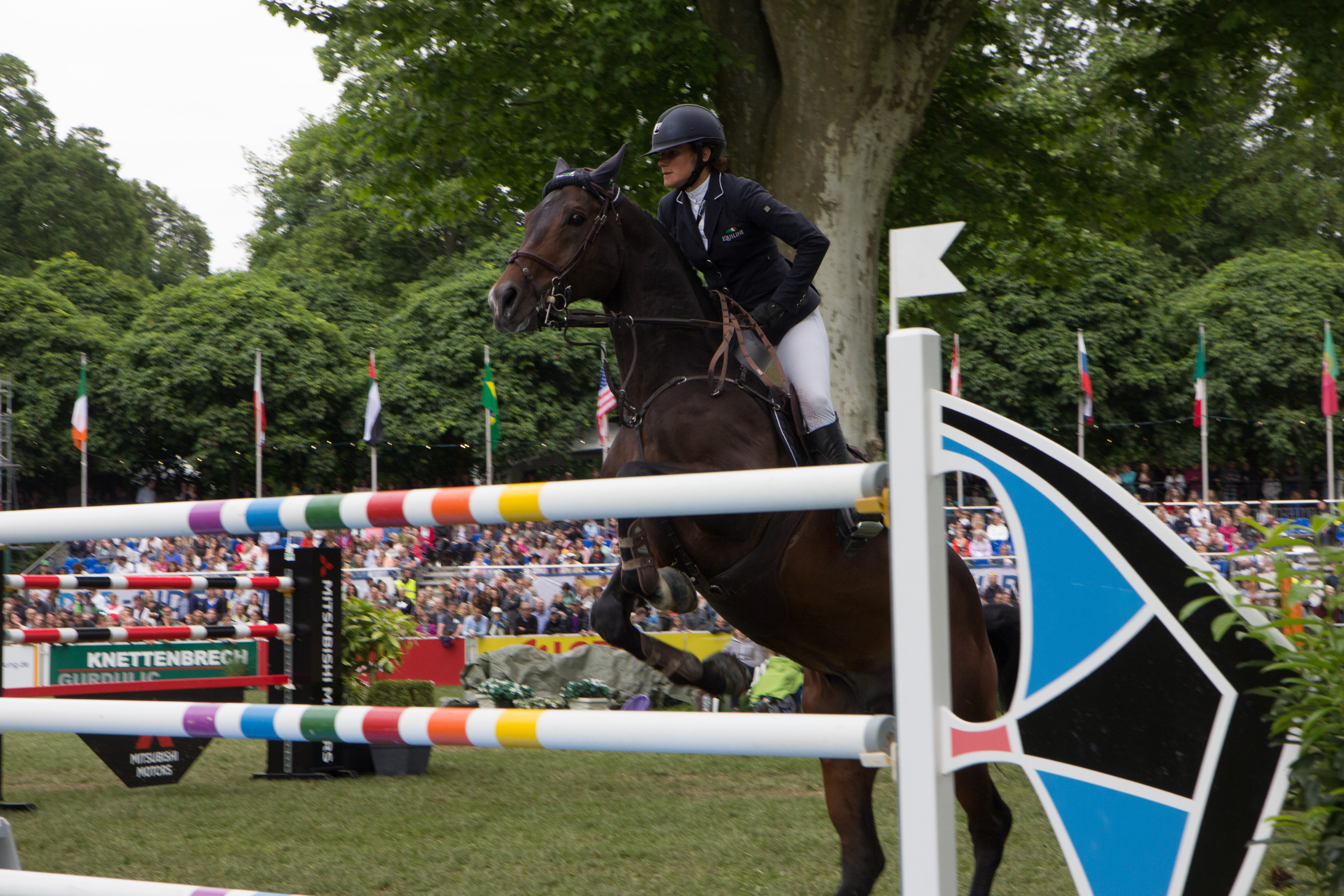 Internationales Wiesbadener Pfingstturnier 2018. CSI 4* Springprüfung KI.S *** m. Stechen (1,50m) "Preis des Hessischen Ministerpräsidenten": Zuzana Zelinkova auf Caleri II